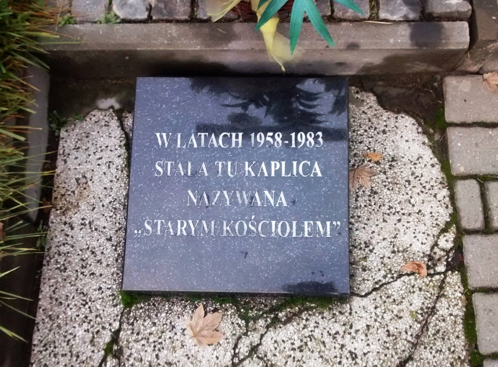 Tablica przed kościołem parafialnym pw. Matki Bożej Nieustającej Pomocy przy ul. Siewnej w Katowicach